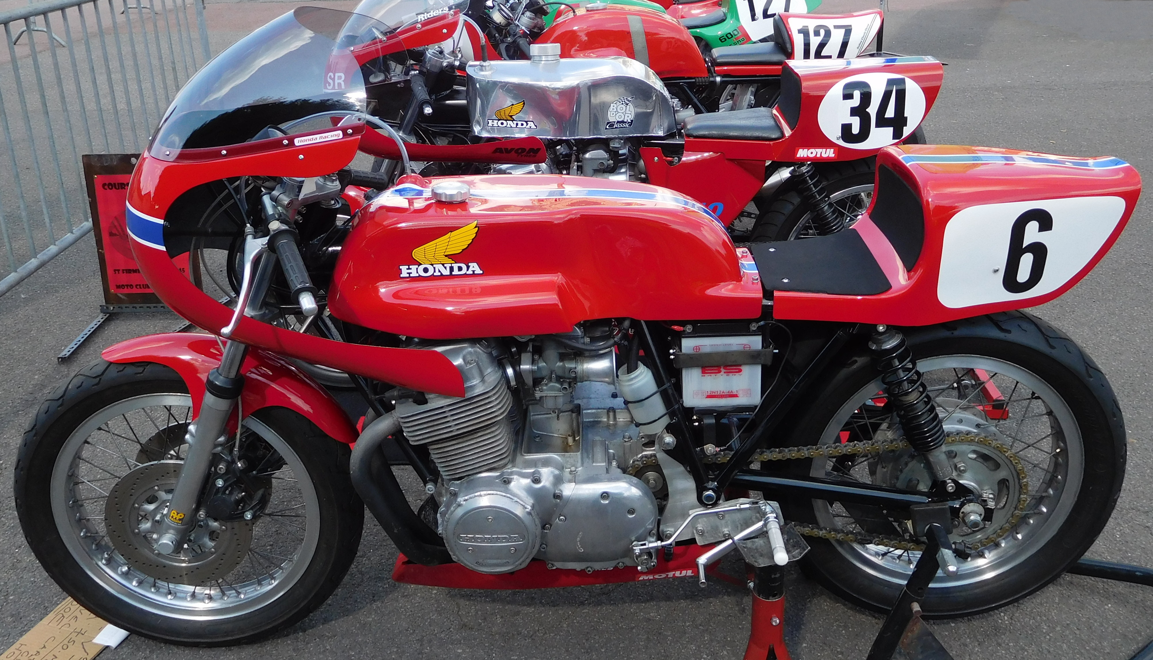 Deux Honda CB 750 Martin de 1972, exposition à Briare, Loiret, France.